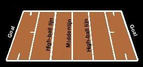 'n Doelbalveld is 18m lank en 9m breed. Die doelgebied is oor die hele breedte van die veld geleë.